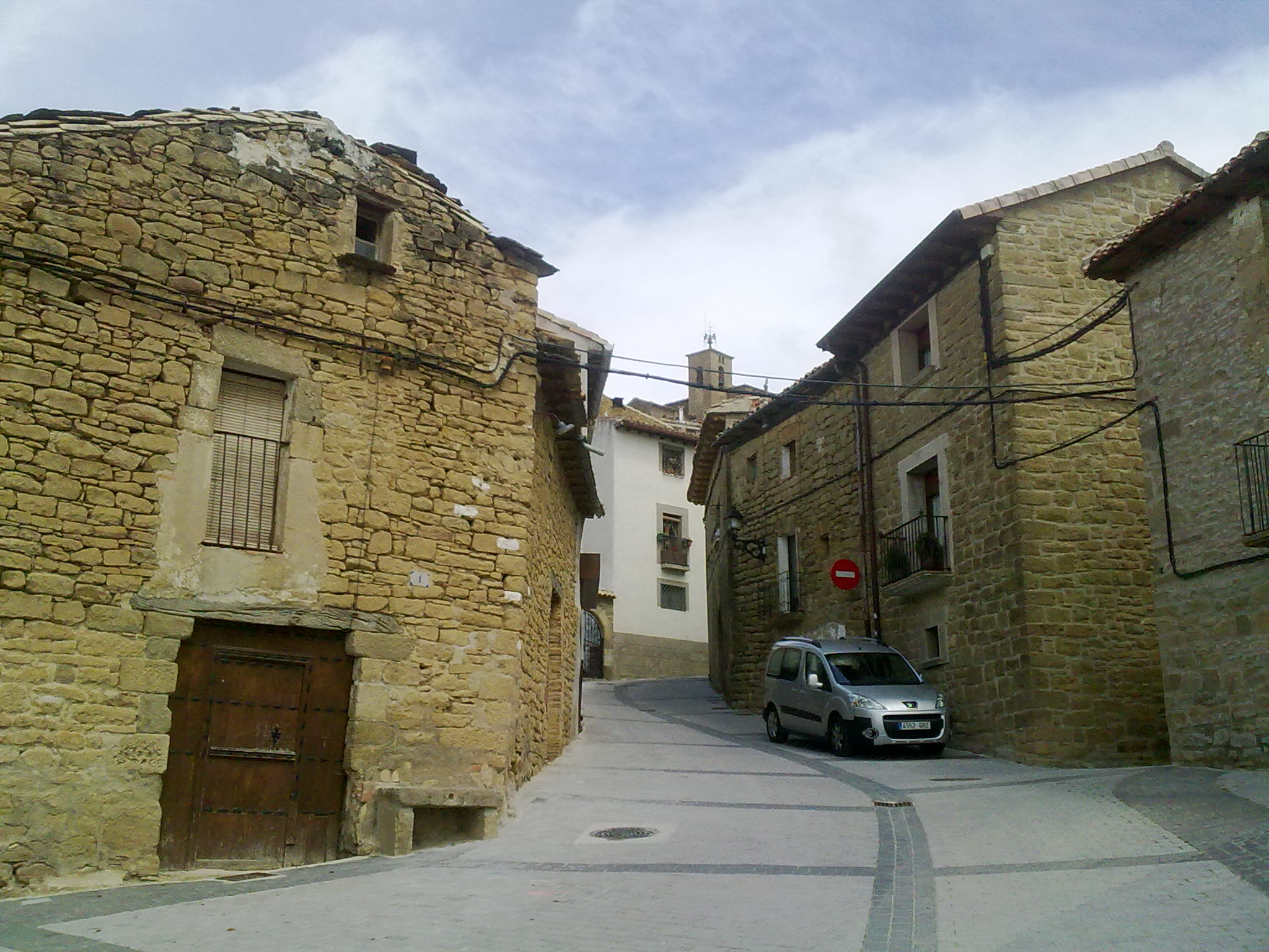 Oibarko kale bat.